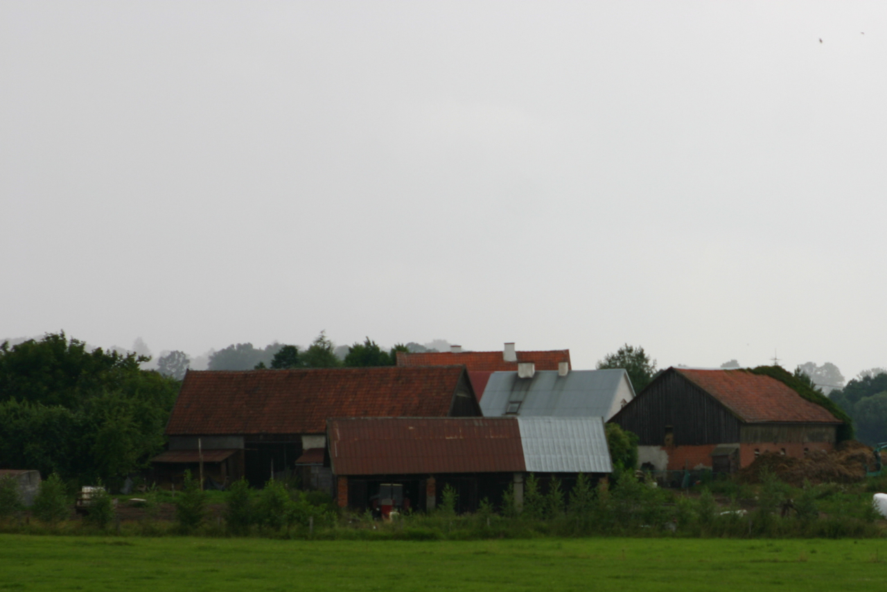 Silec - wieś w Polsce w województwie warmińsko-mazurskim, w powiecie kętrzyńskim, w gminie Srokowo.